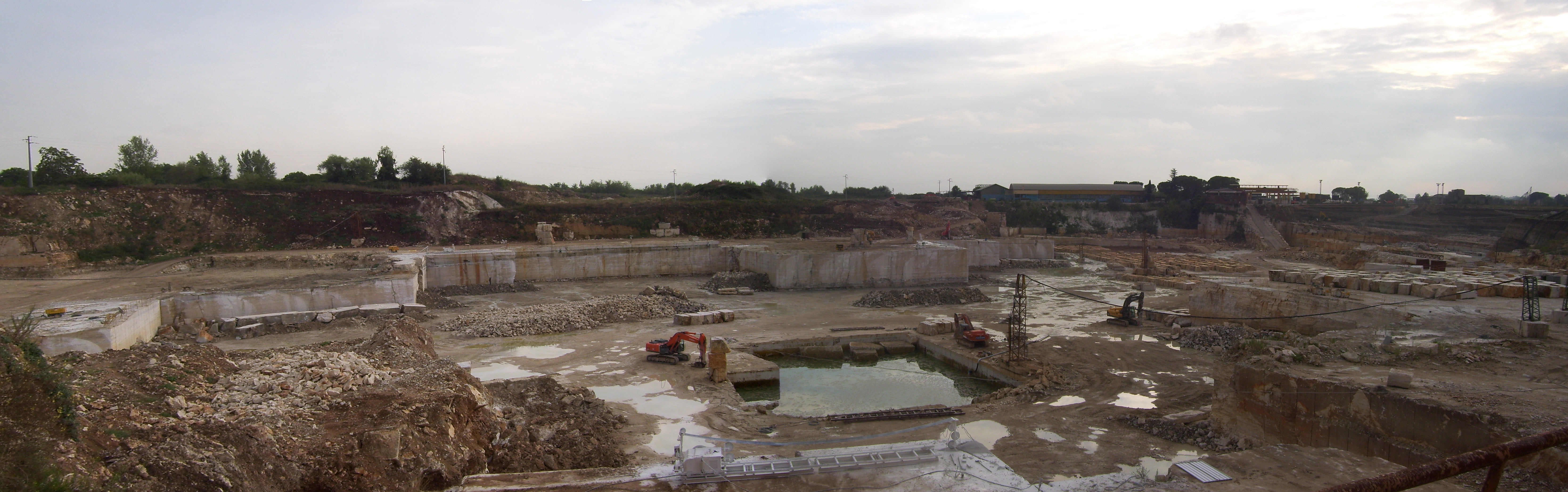 Cave di travertino a Guidonia, via Pantano.